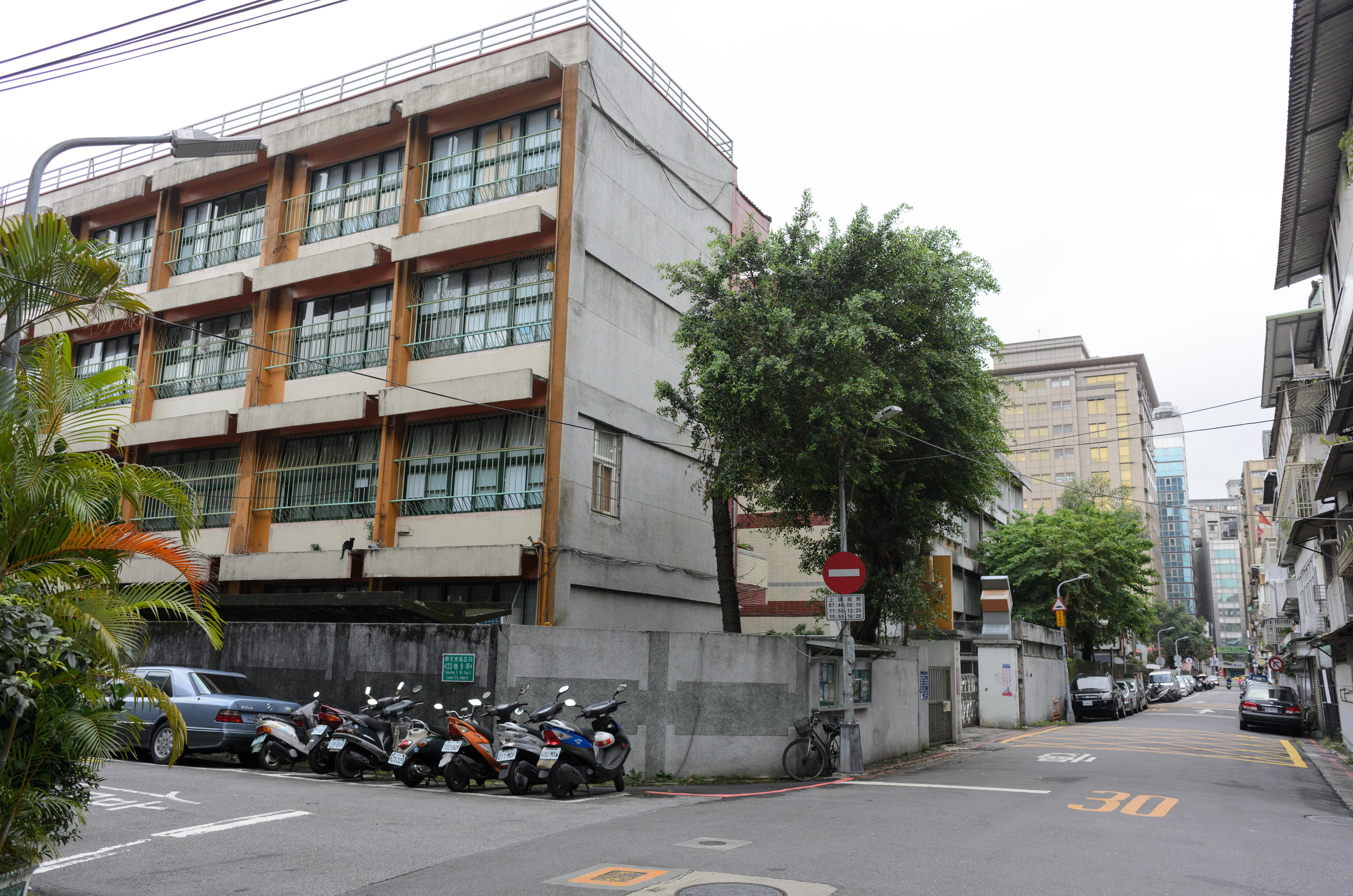 中文（台灣）: 從臺北市松山區南京東路五段147巷與南京東路五段123巷8弄路口，東南望西松國小西北角。